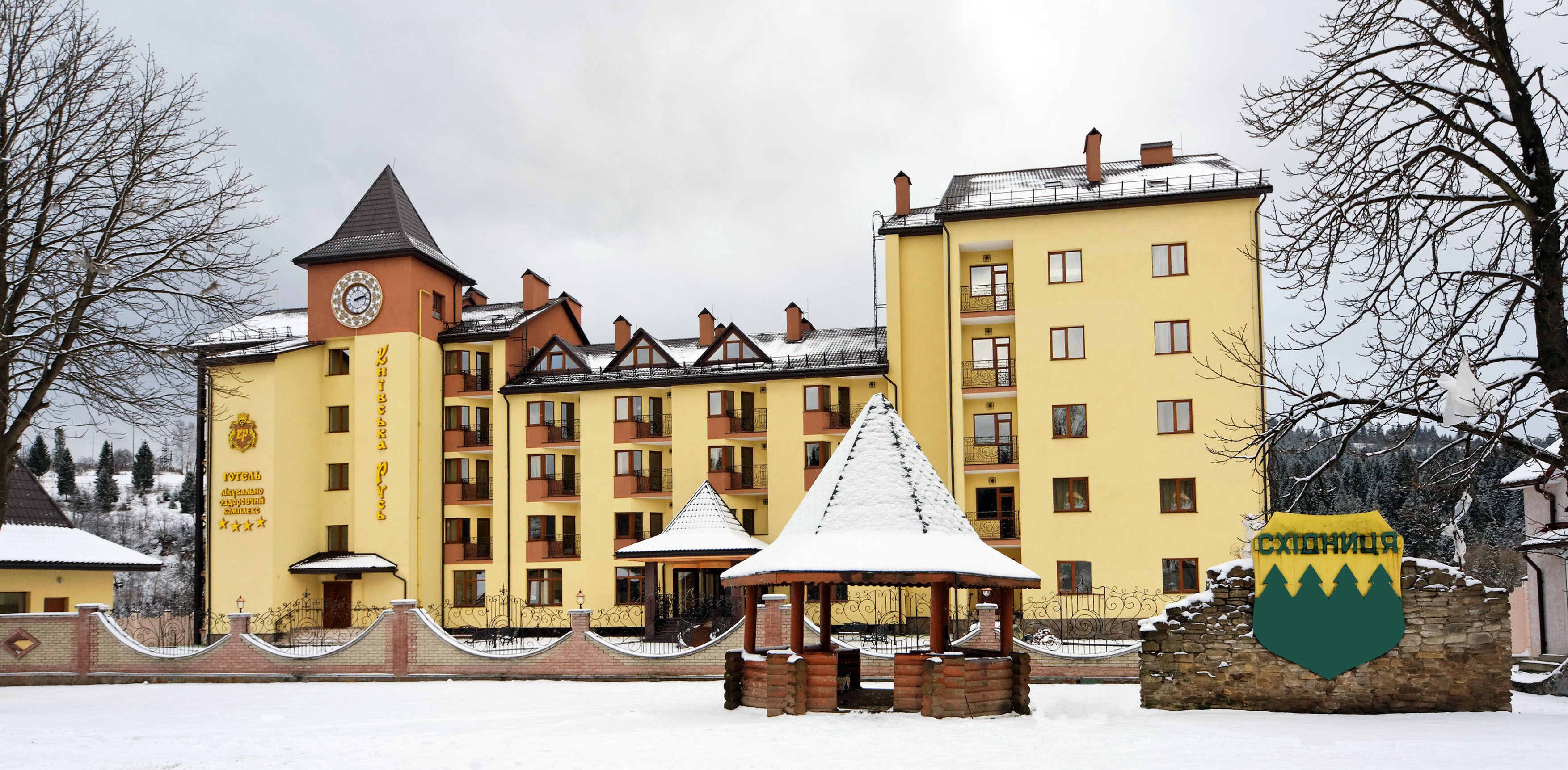 Київська Русь - Східниця